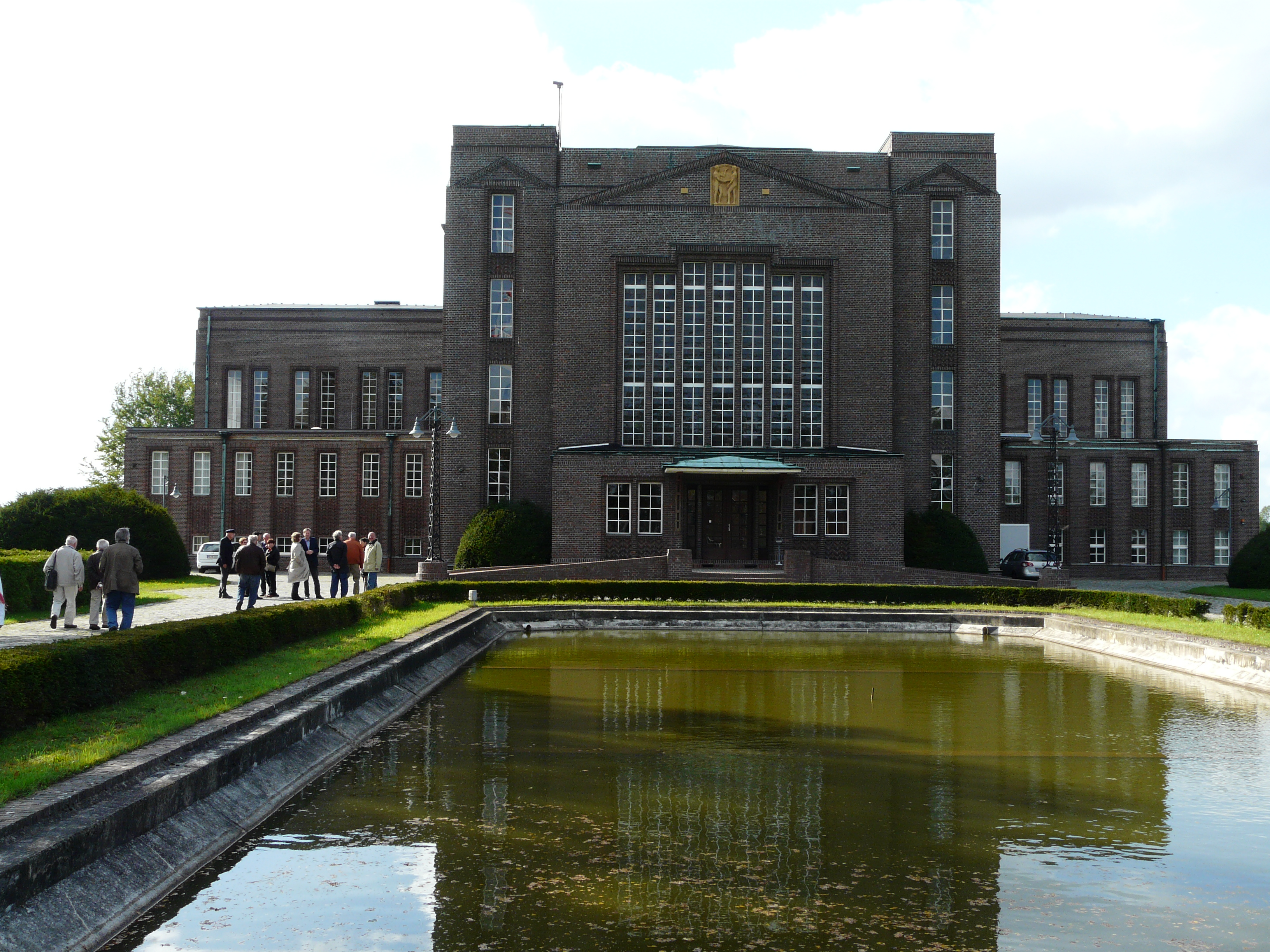 Denkmalgeschütztes Hauptgebäude Funkbetriebsstelle Nauen / Saalekreis; Architekt Hermann Muthesius